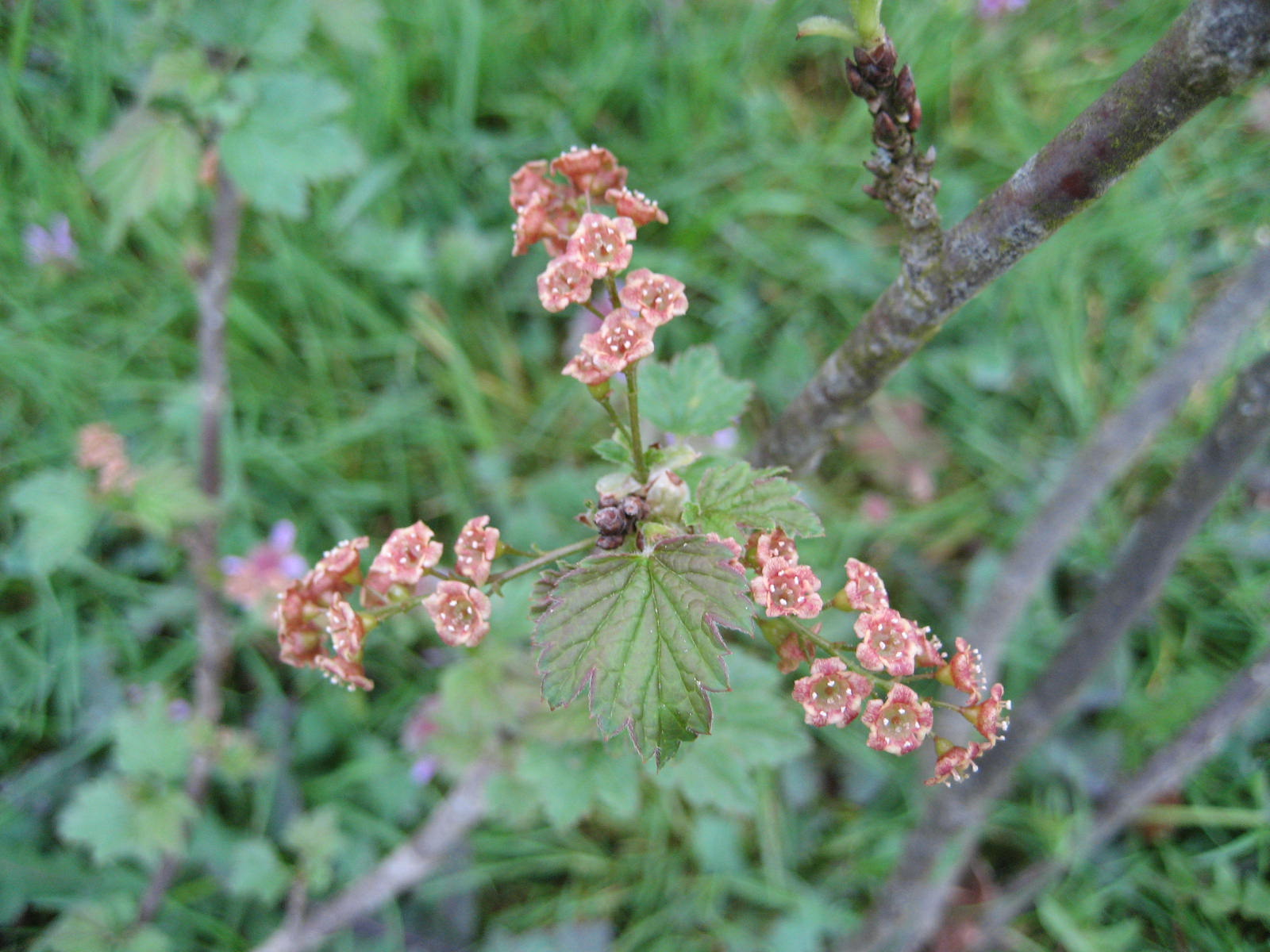 Ribes spicatum - Blüte - Bot. Garten Berlin Dahlem